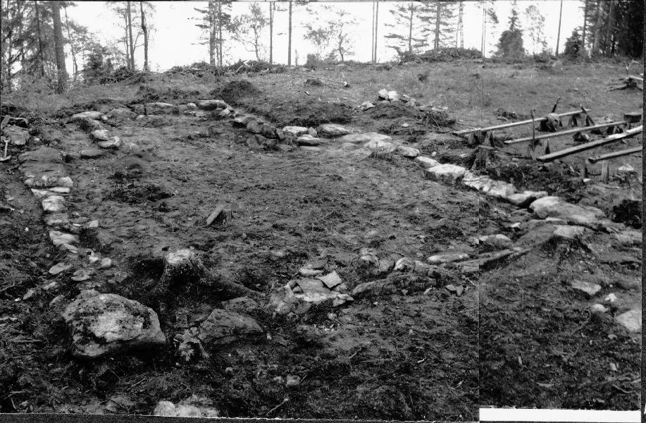 Kapellet från västnordväst. Kategori: (01) Exteriörer, detaljer Kapellet från västnordväst.